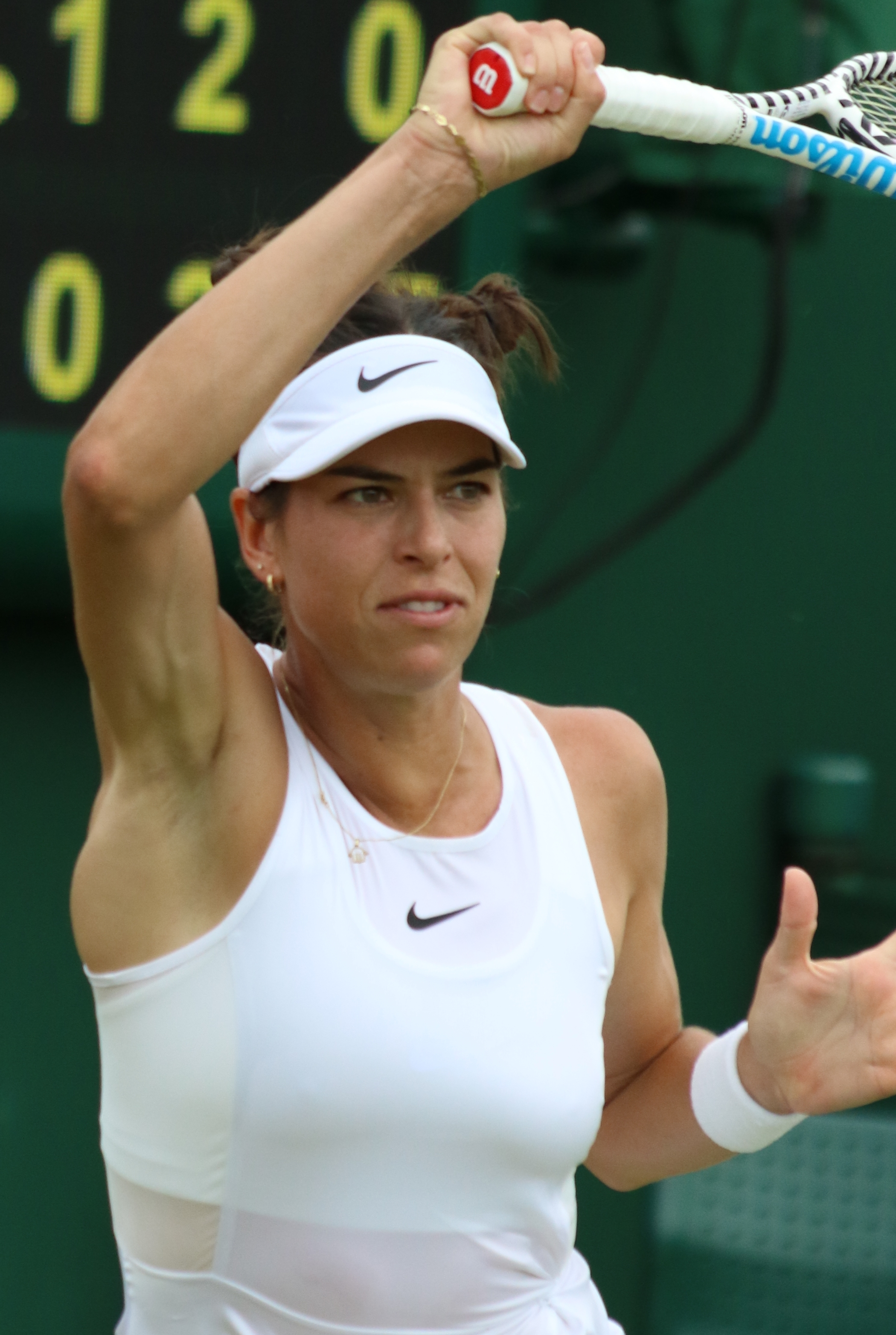 Tomljanovic WM19 (28)